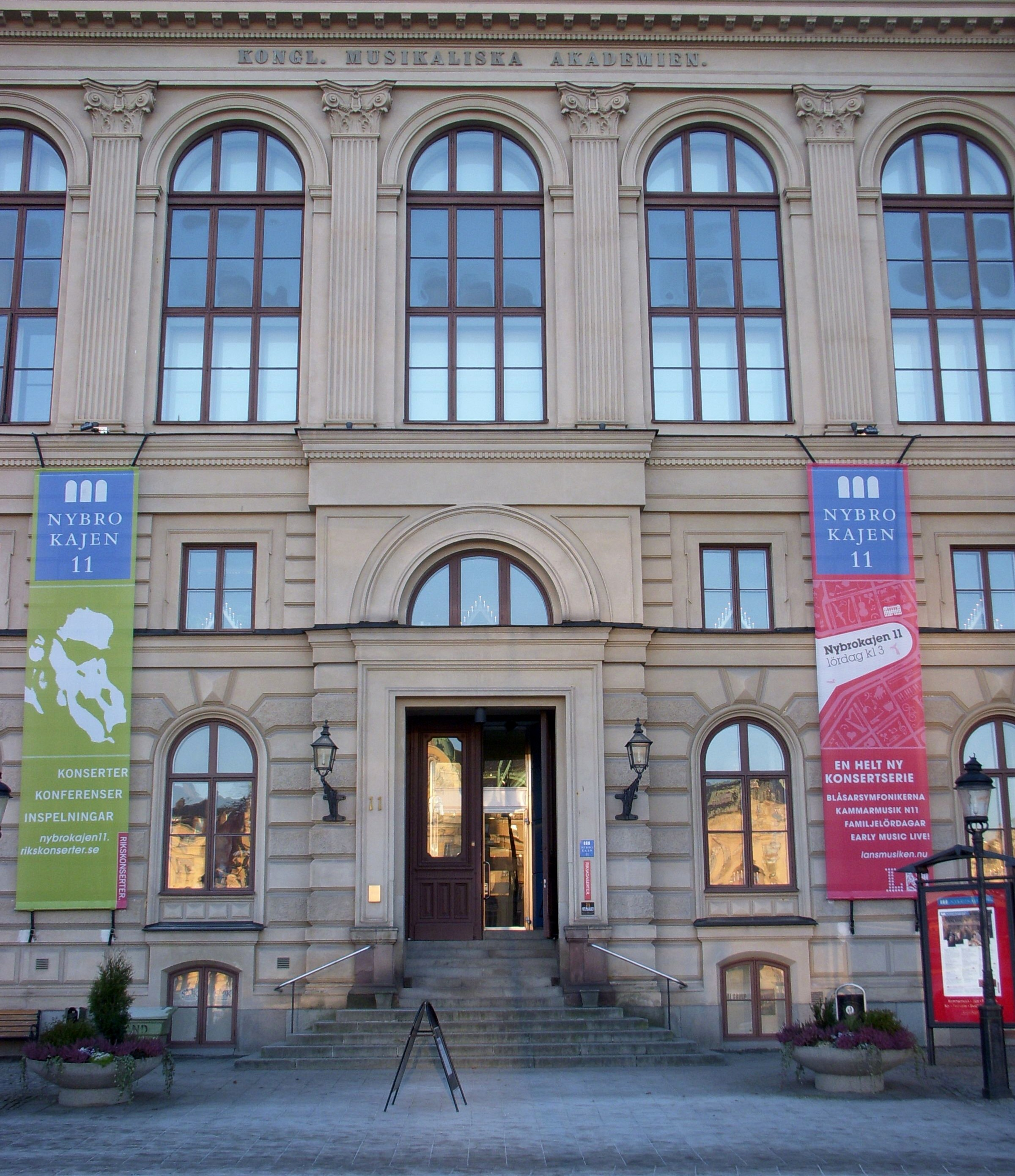 Kungliga Musikakademien i Stockholm